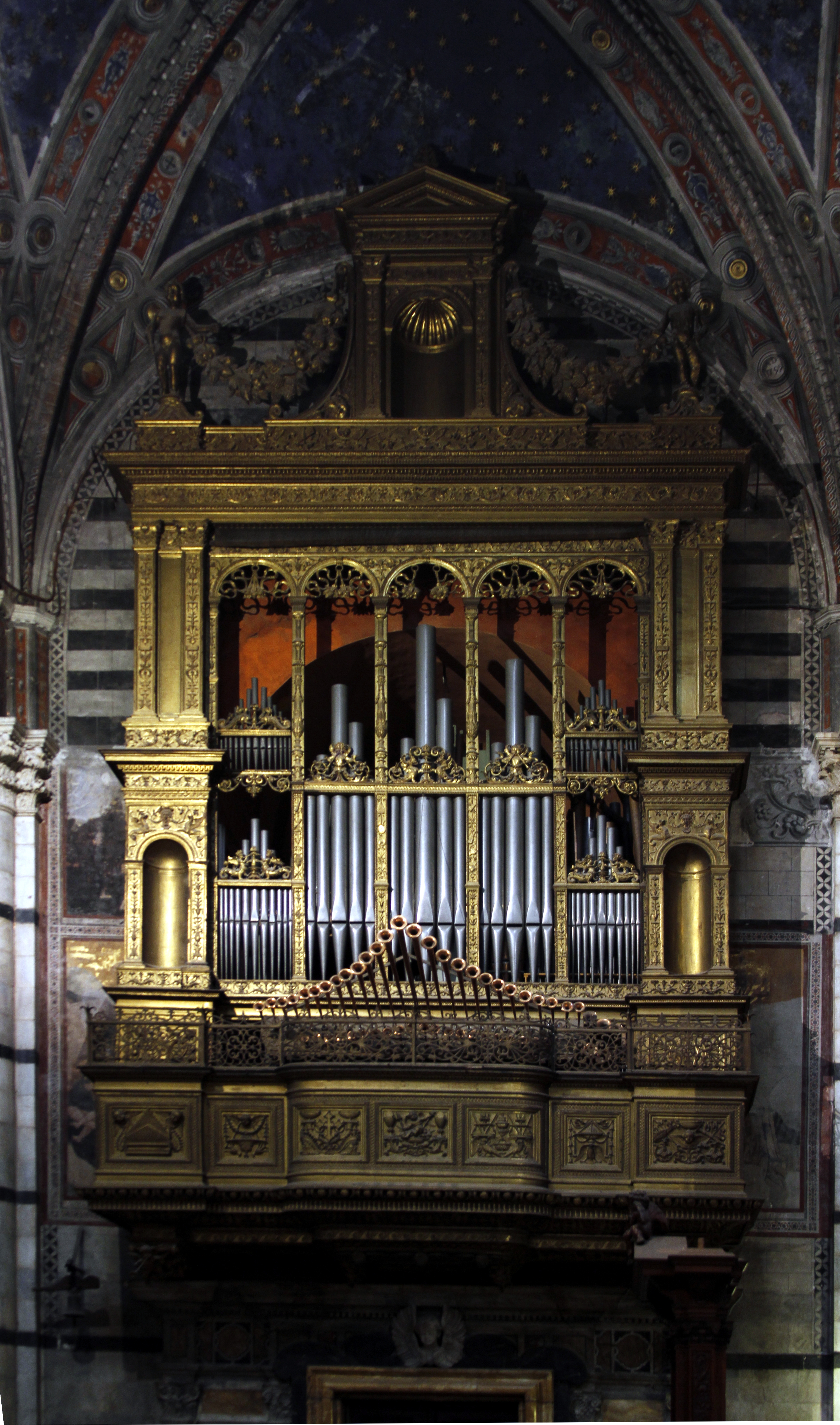 Duomo - Siena